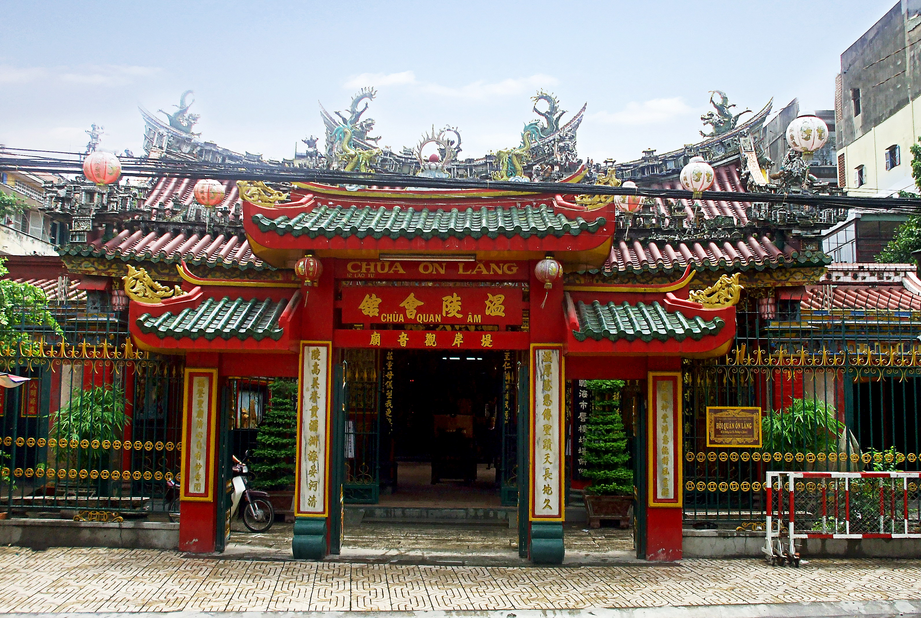 Chùa Ôn Lăng, quận 5, Thành phố Hồ Chí Minh.